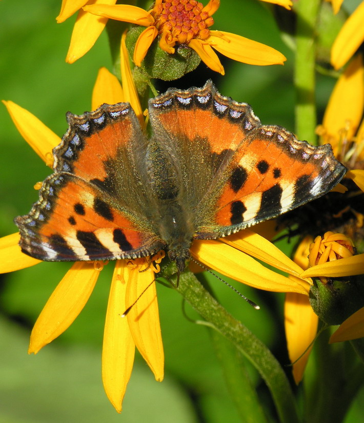 Dilgėlinukas (Aglais urticae, syn. Nymphalis urticae), Lietuva